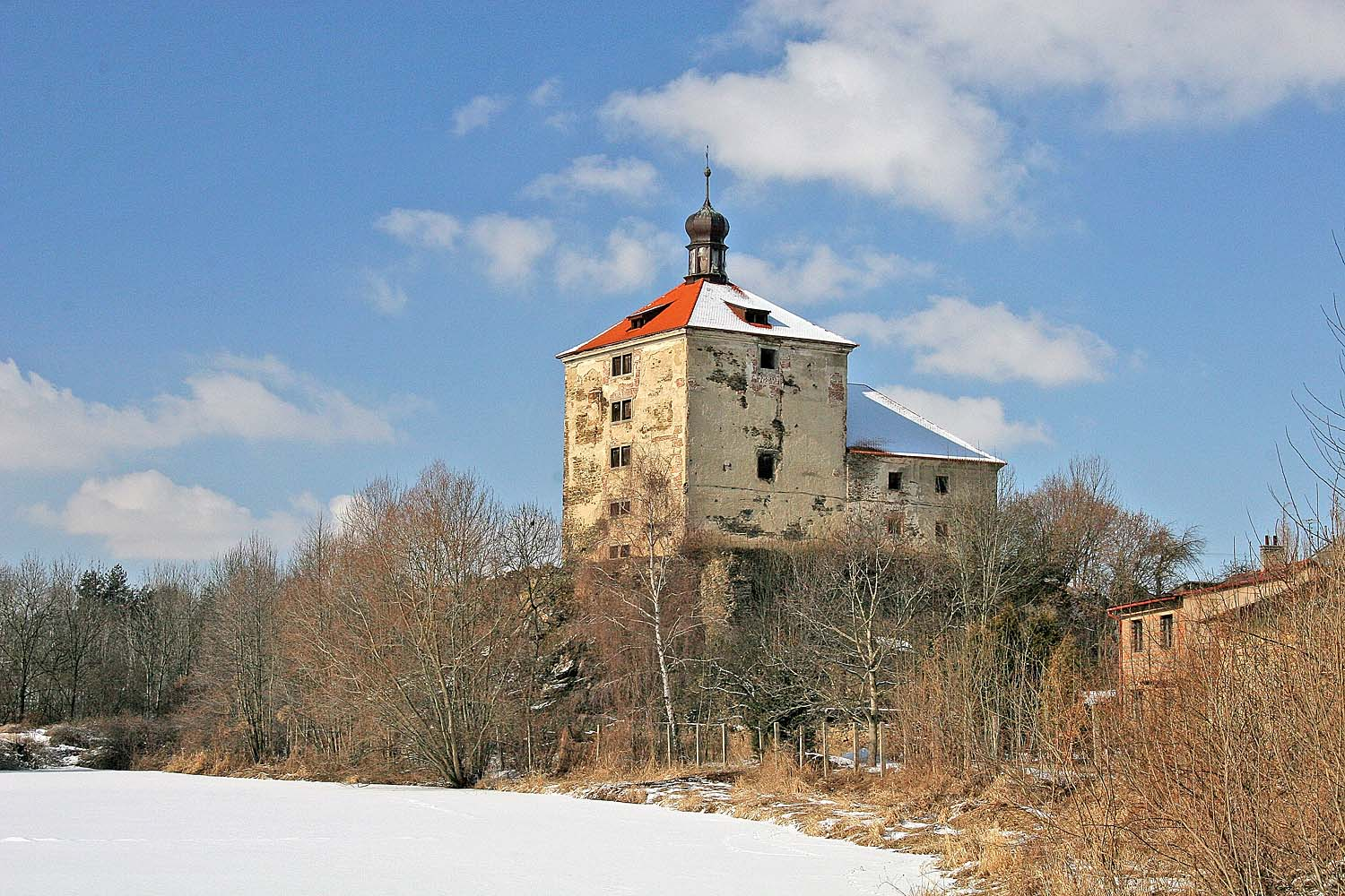 Tvrz v městysu Malešov v okrese Kutná Hora autor: Prazak date: 27. 2. 2006